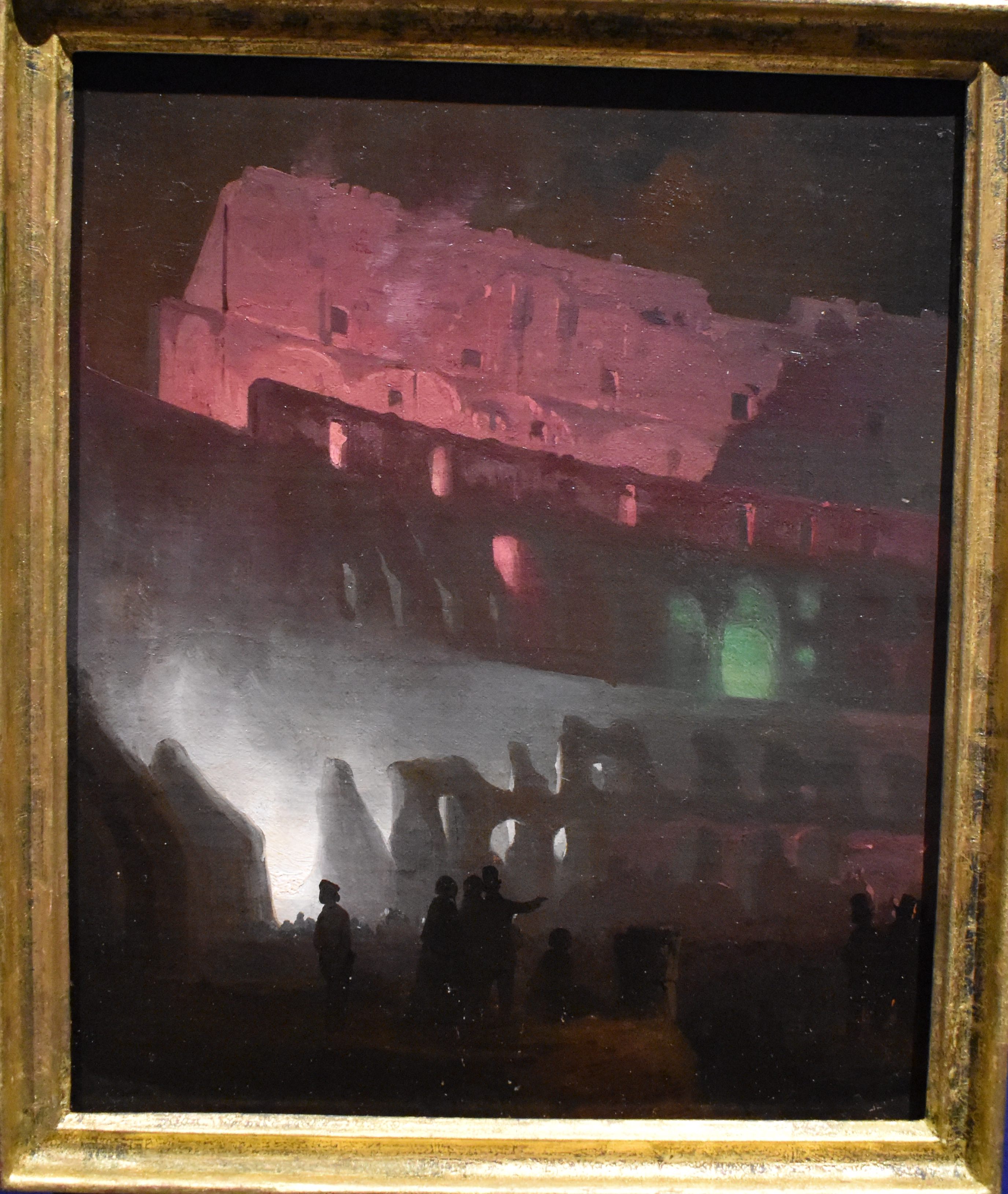 Ippolitto Caffi, Colosseo illuminato a fuochi di bengala, 1856 ca., 36x29 cm, olio su cartoncino intelato